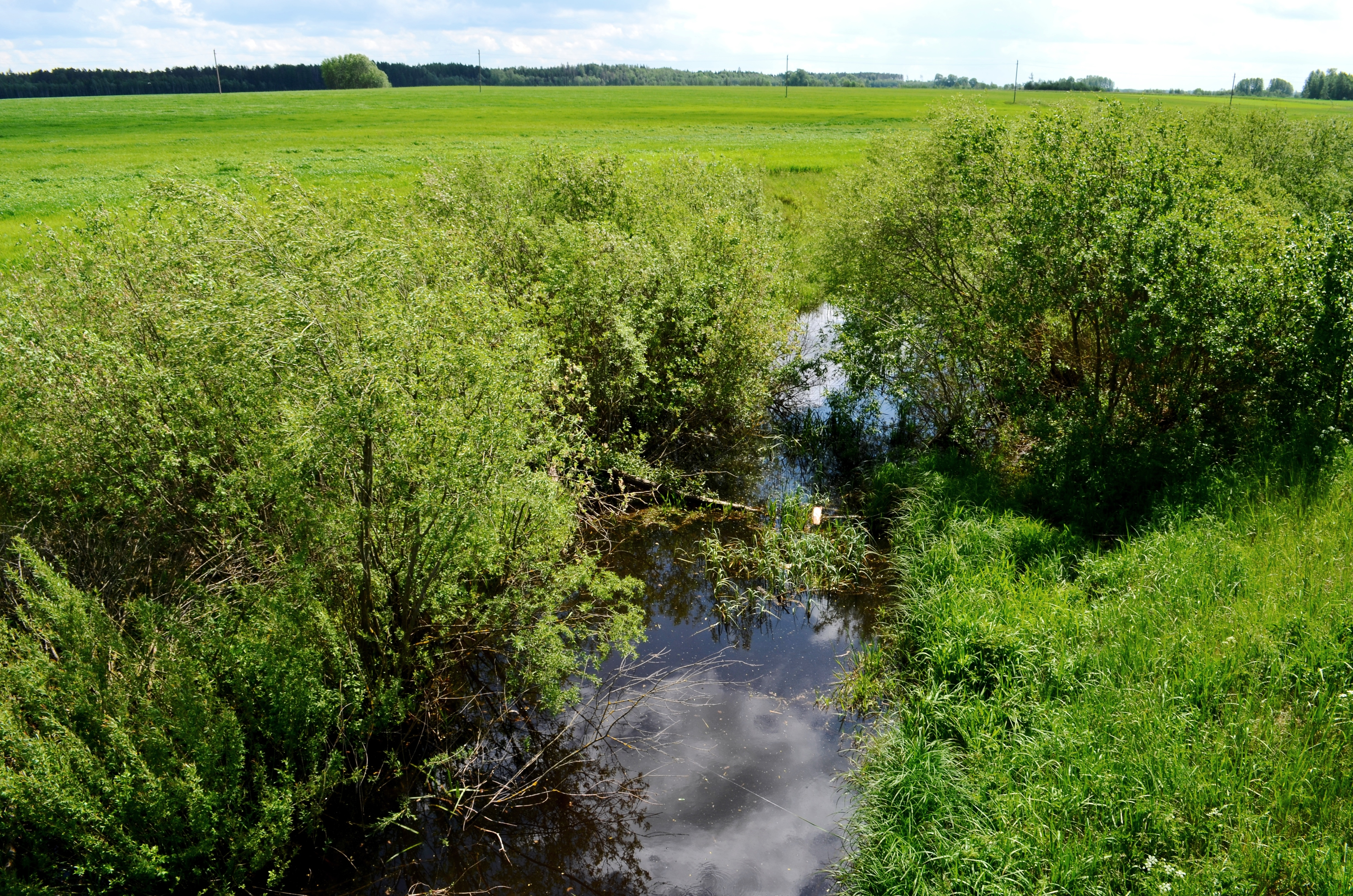 Nevėžis Laukagalių apylinkėse, Anykščių raj.